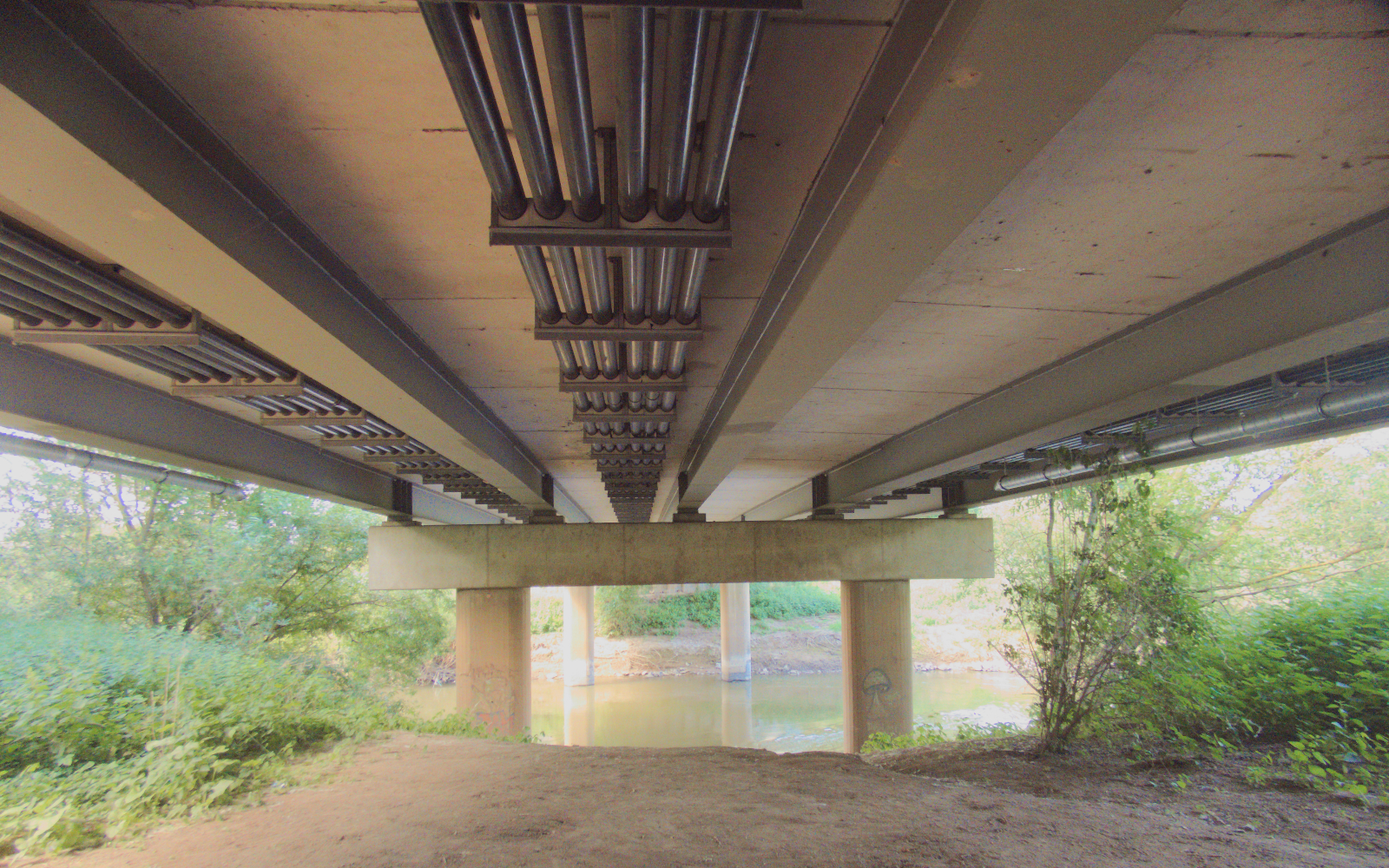 Versorgungsleitungen an der Unterseite der Klappenburgbrücke.